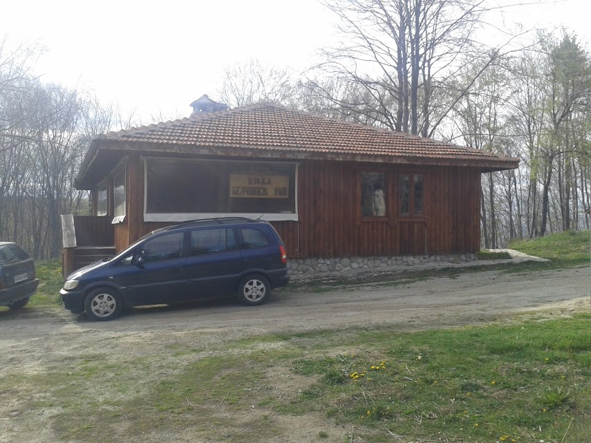 "Belchinski rai" Hut